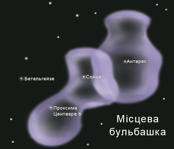 Місцева бульбашка